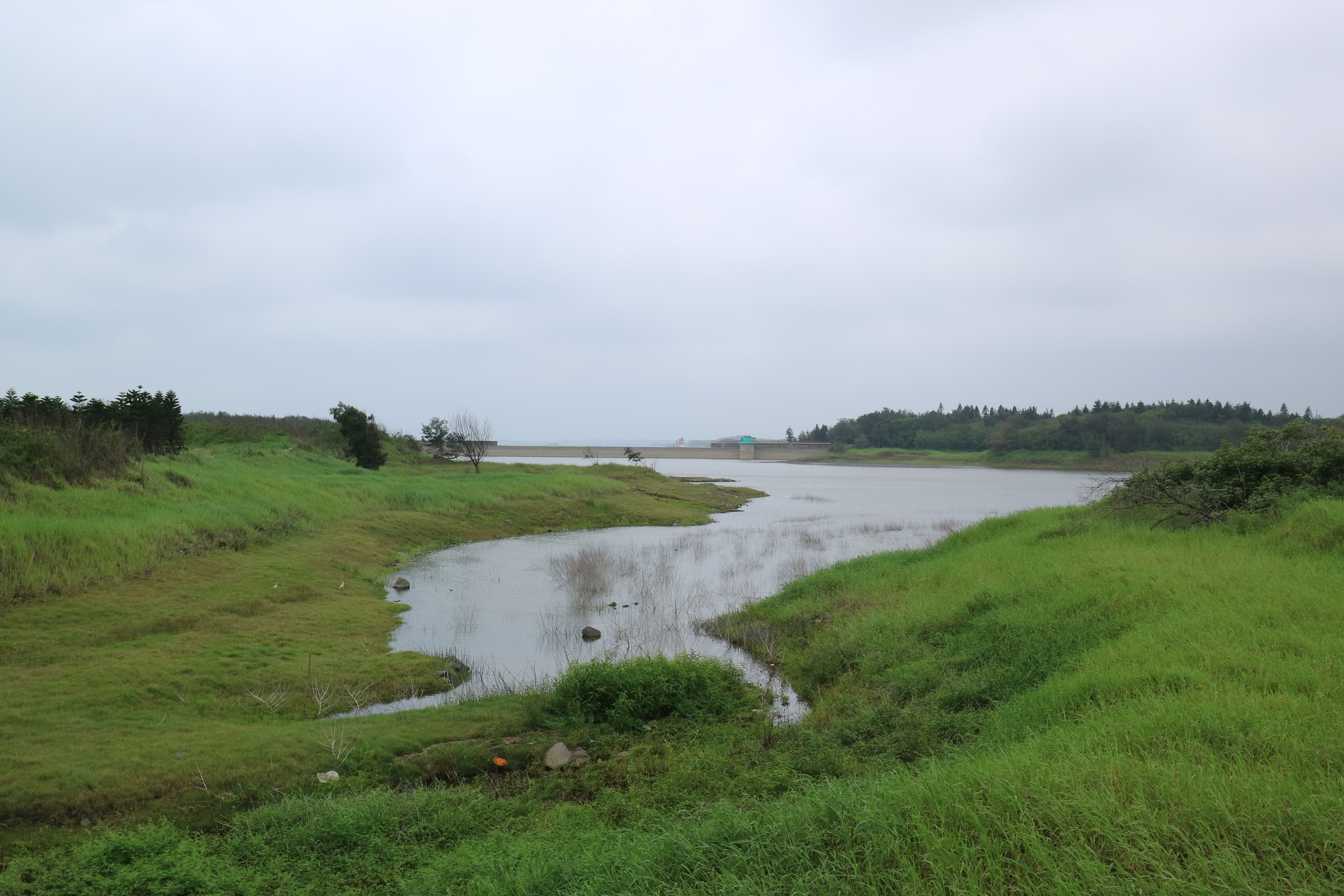 臺灣澎湖縣馬公市興仁水庫